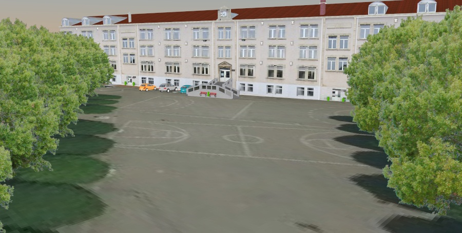 Fait par Langlois Julien sous SketchUp